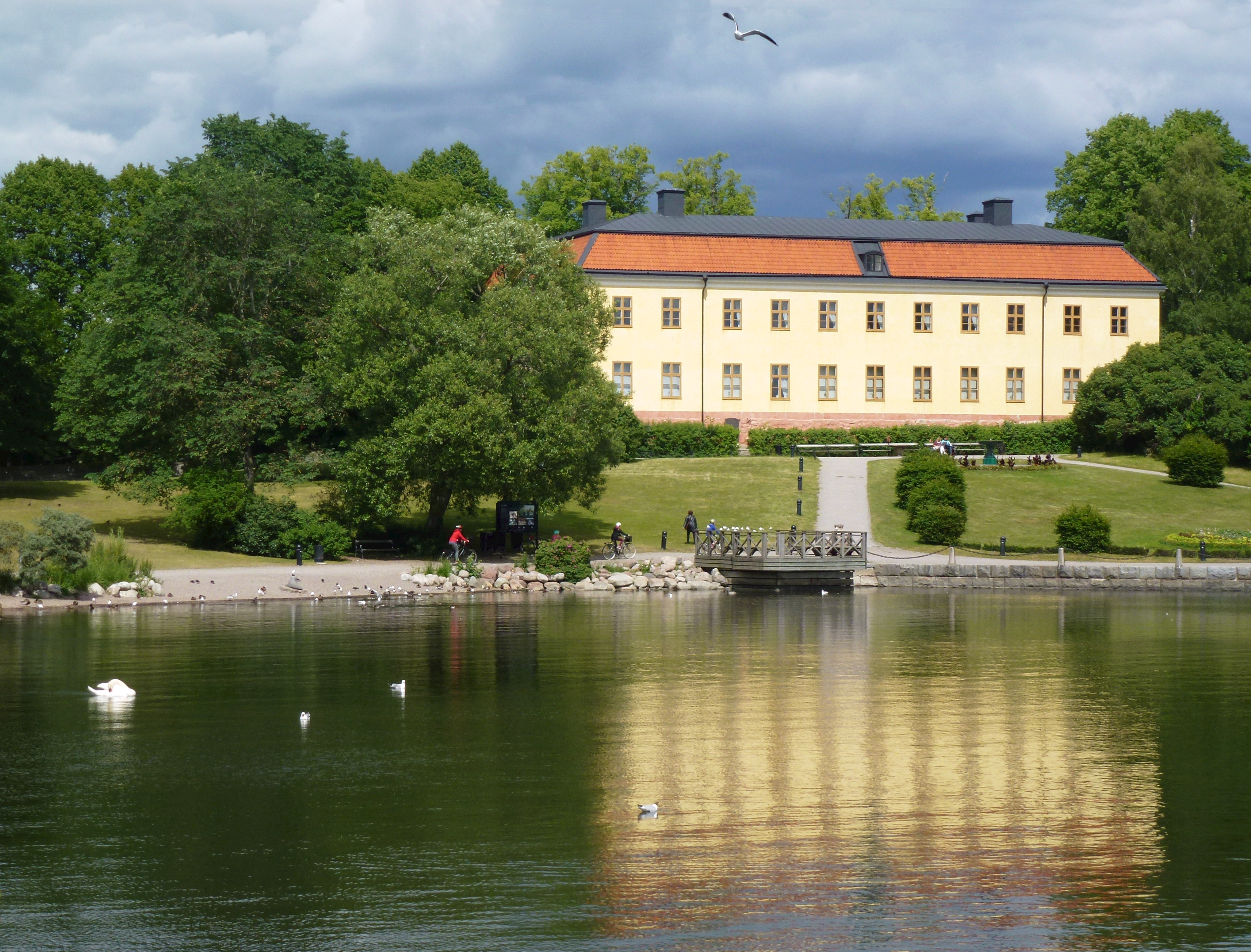 Edsbergs slott sydsida